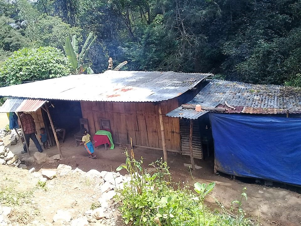 Hütte in Baboi Leten, Atsabe, Ermera, Osttimor